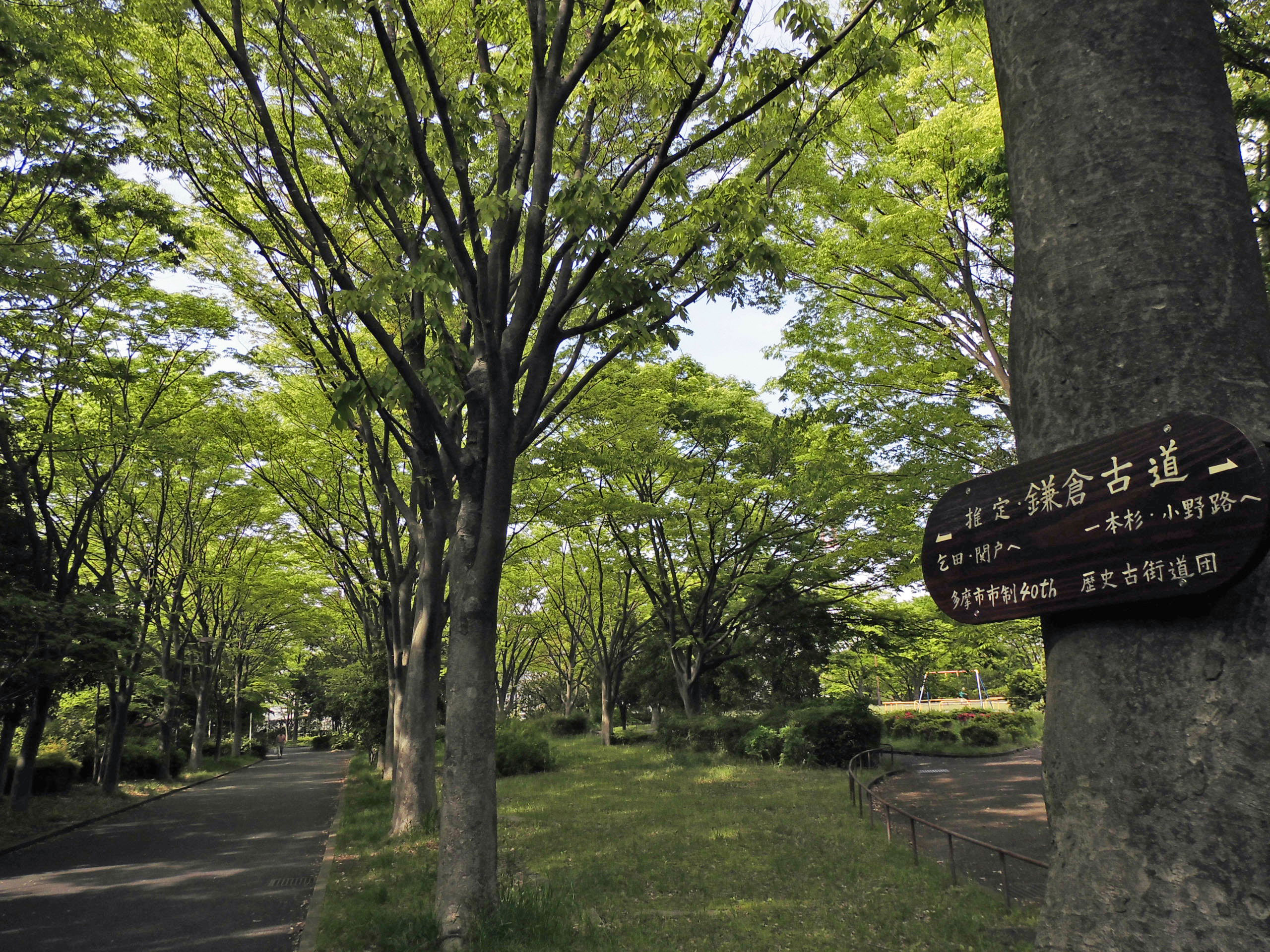 多摩ニュータウンの遊歩道として整備された鎌倉古道